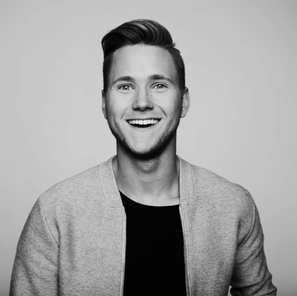 Pressbild Viktor Frisk